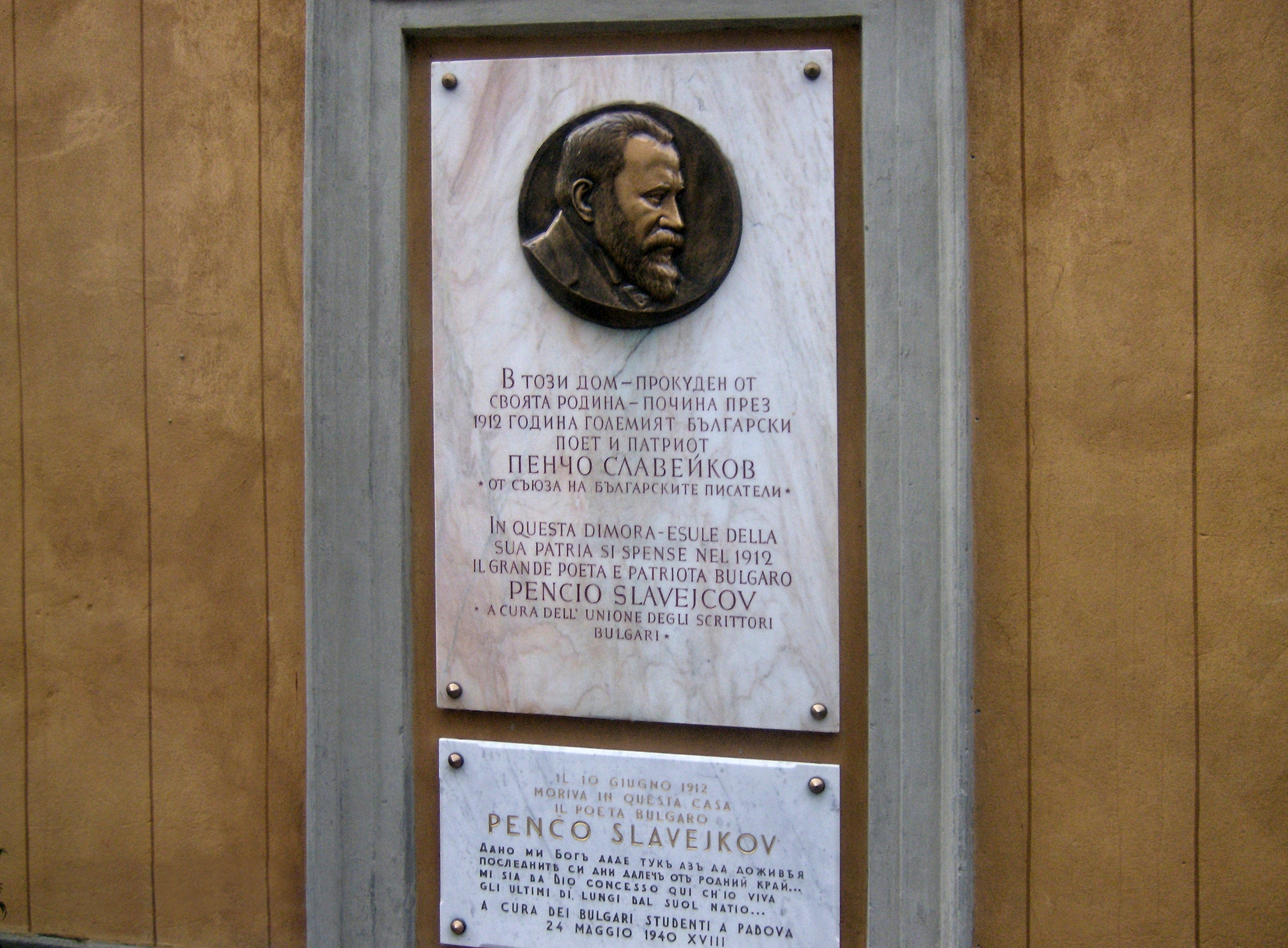 Lapidi di Penco Slavejkov